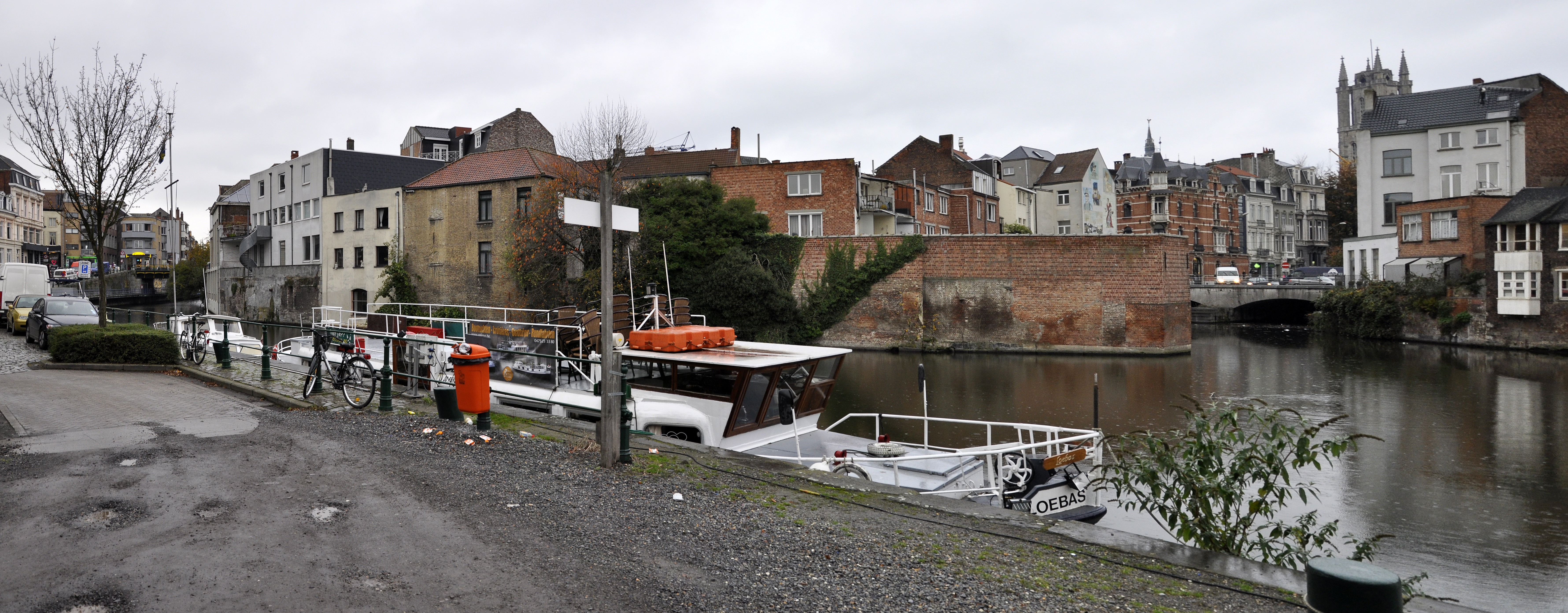 Gent met links de Ketelvaart en de Marcellisbrug en rechts de Nederschelde en de vroegere Braemgaten aan de Brabantdam